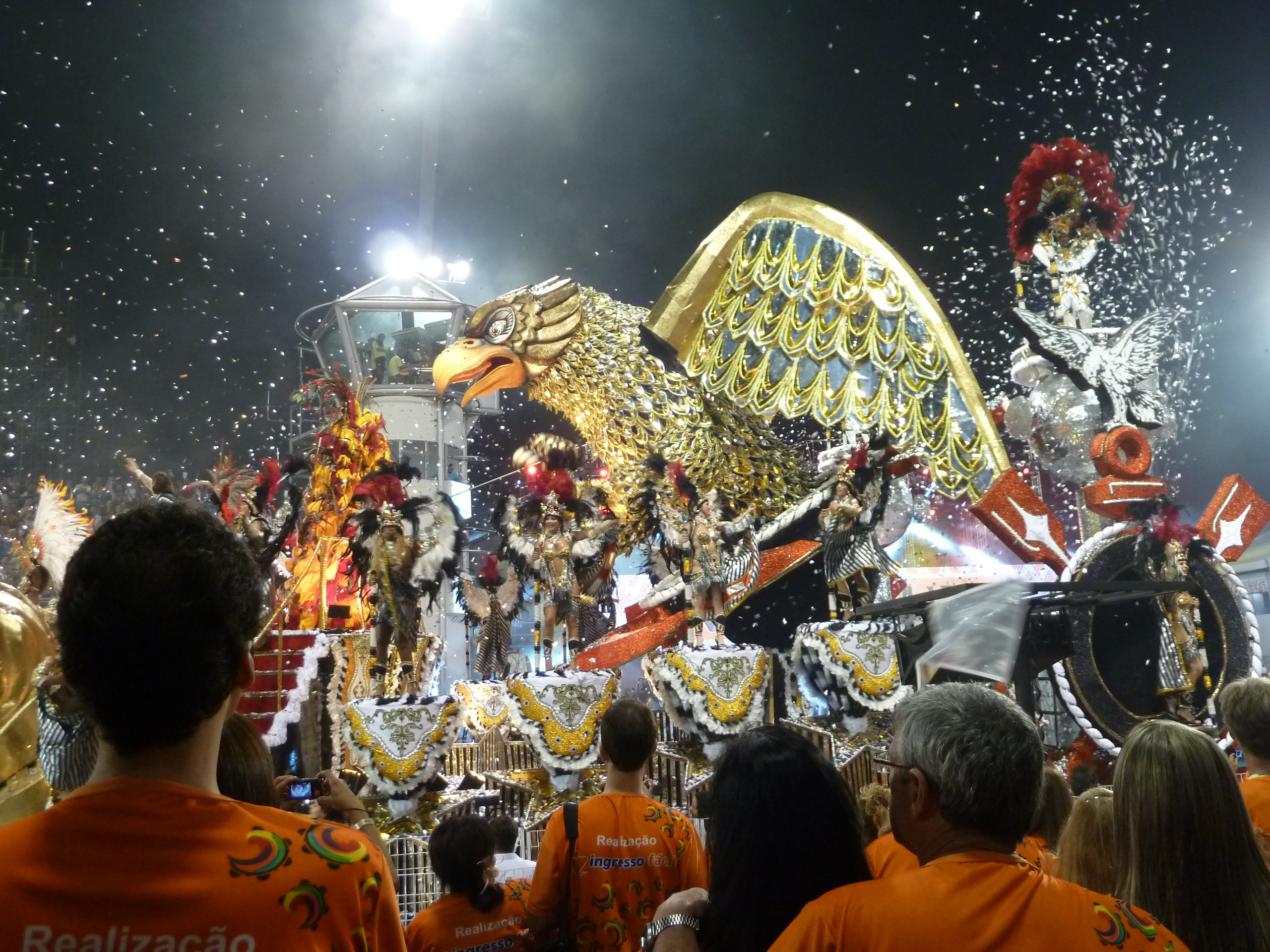 Carro alegórico da escola de samba Gaviões da Fiel no Carnaval de São Paulo, Brasil, em 2013.